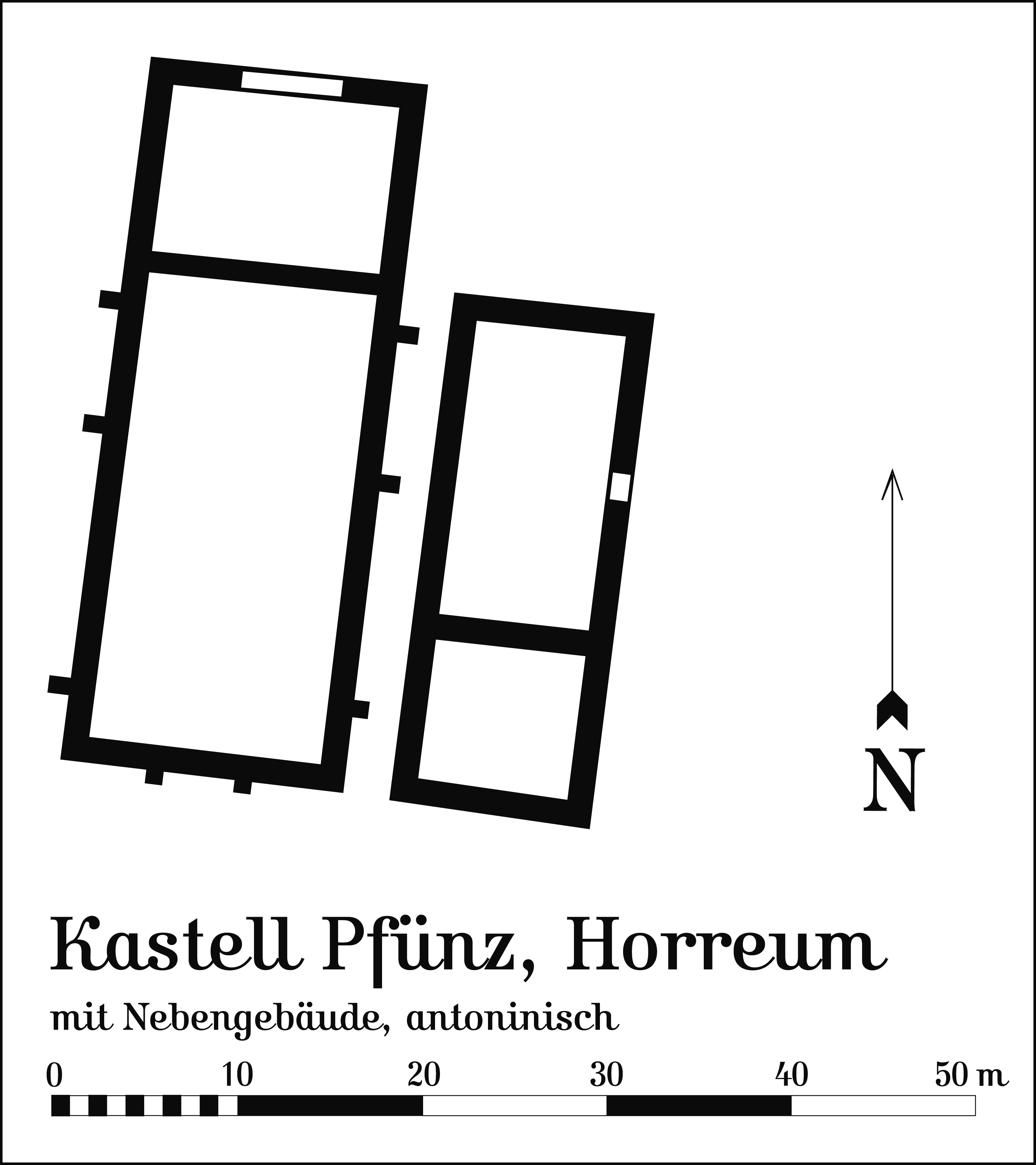 Kastell Pfünz, Altmühltal, Bayern, Horreum (Getreidespeicher)